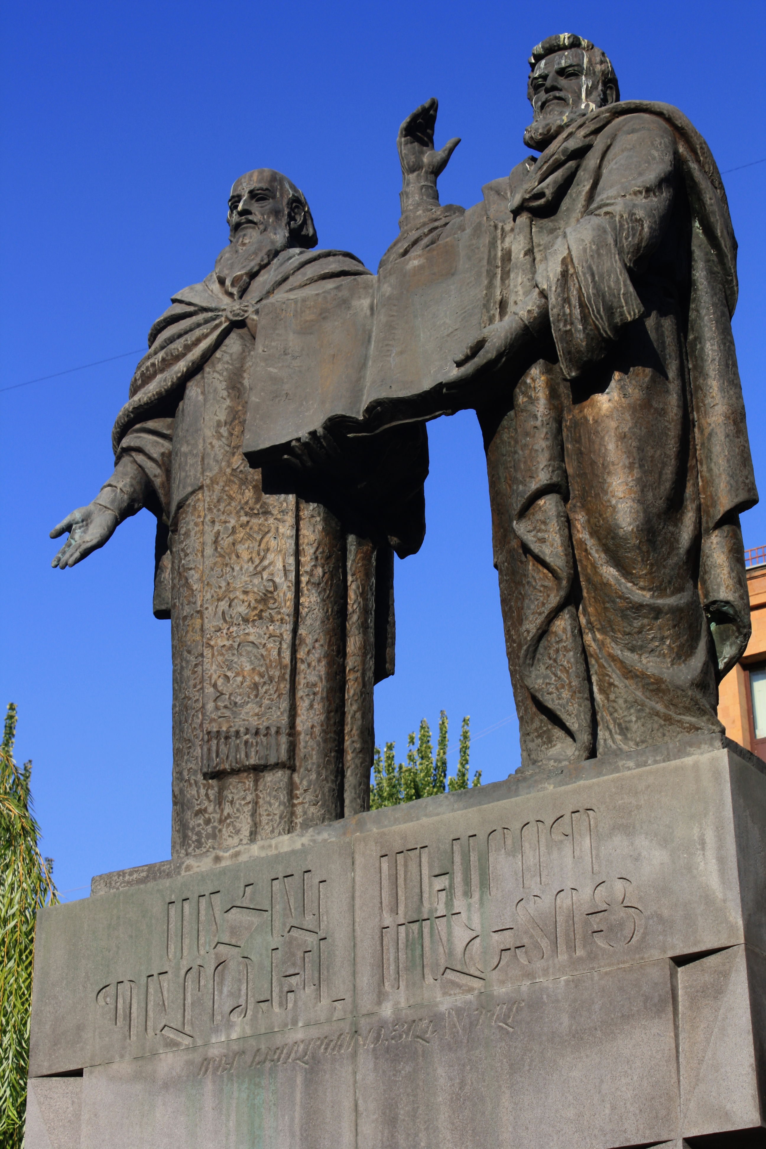 Սահակ Պարթև և Մեսրոպ Մաշտոց